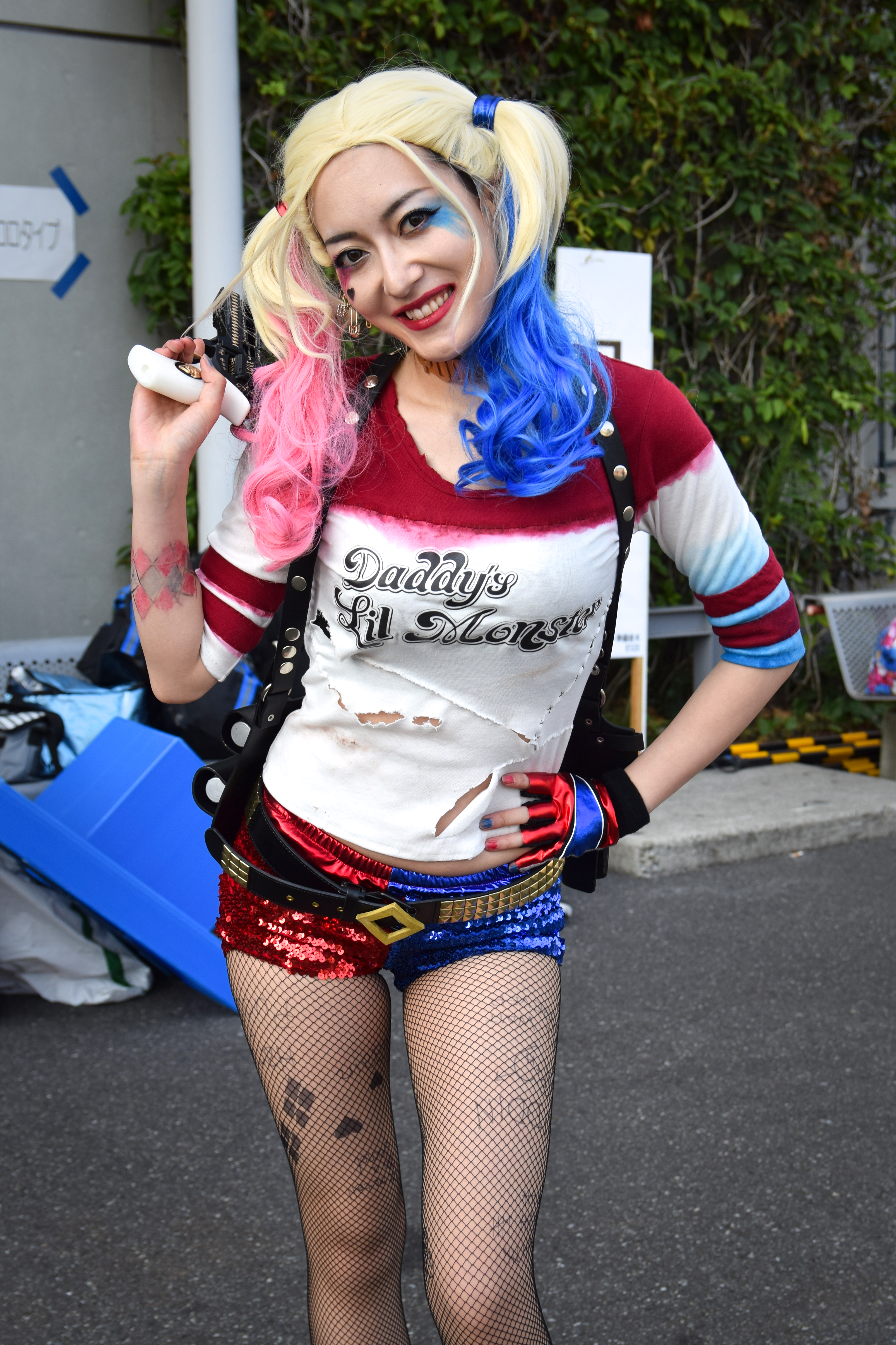 ハーレイ・クインコス